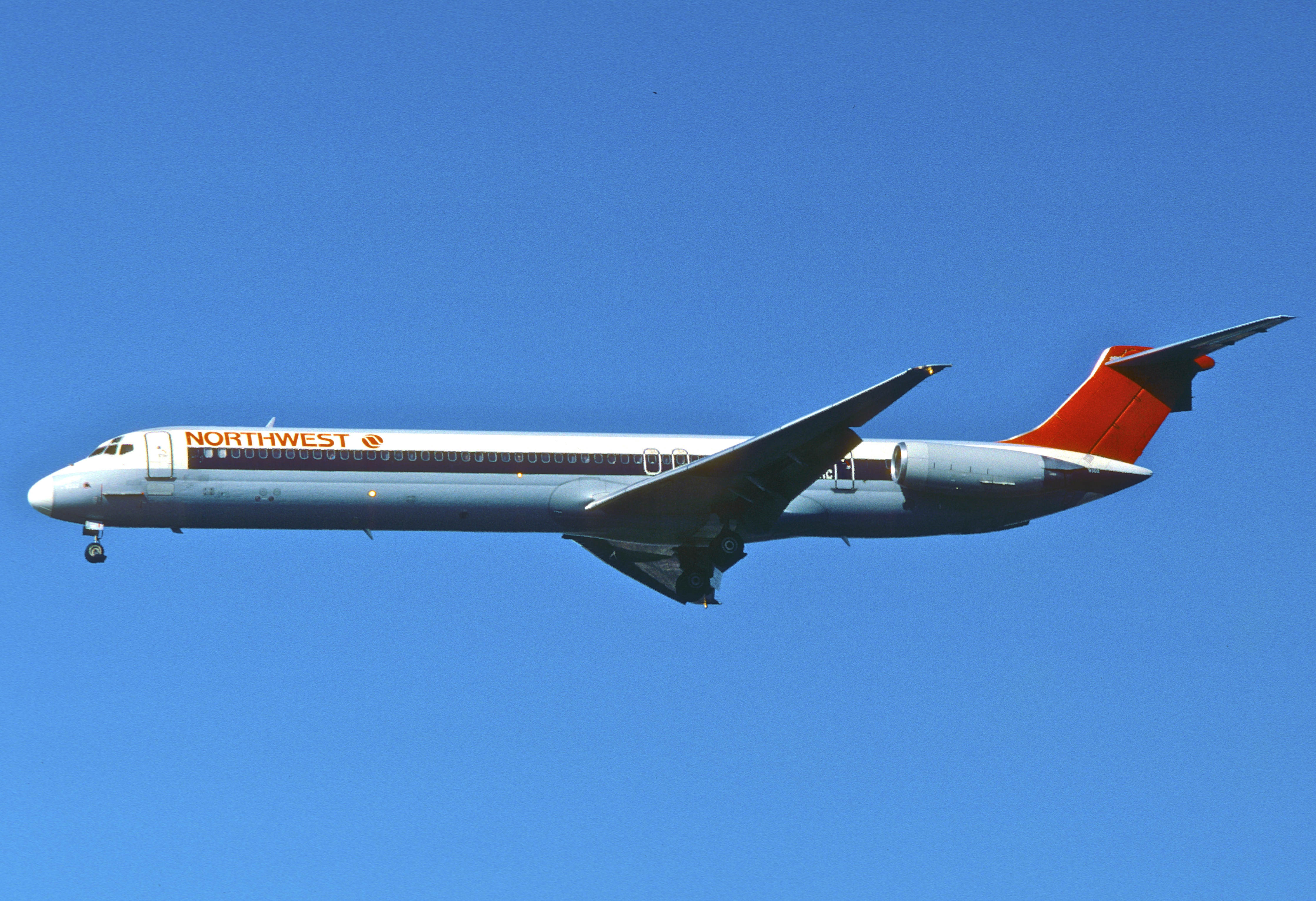 Northwest Airlines MD-82; N302RC@ORD, August 1992/ DTN